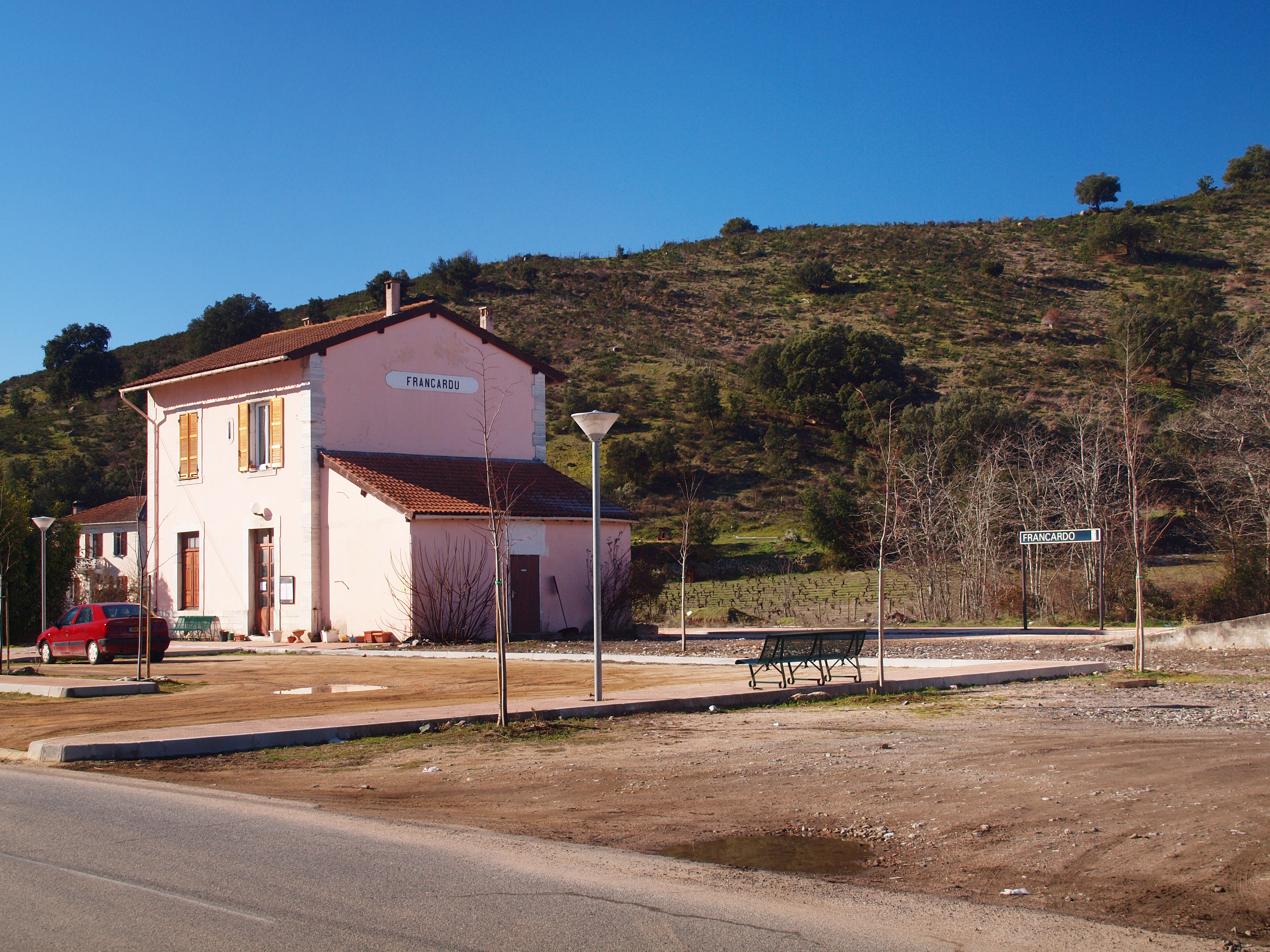 Omessa (Corse) - Gare CFC de Francardo